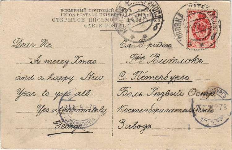 Почтовая открытка из Юзовки